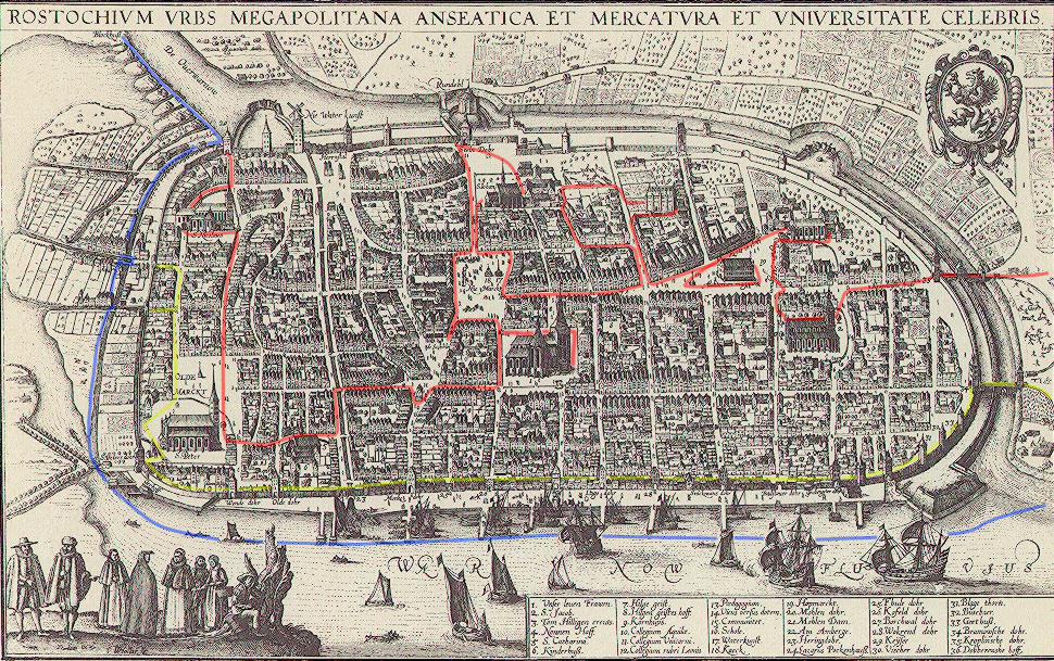 Spur der Vicke Schorler Rolle auf der Karte von Rostock von 1683